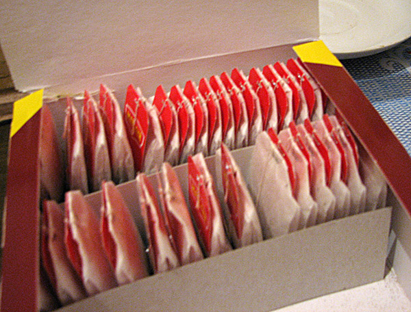 Чайный пакетик